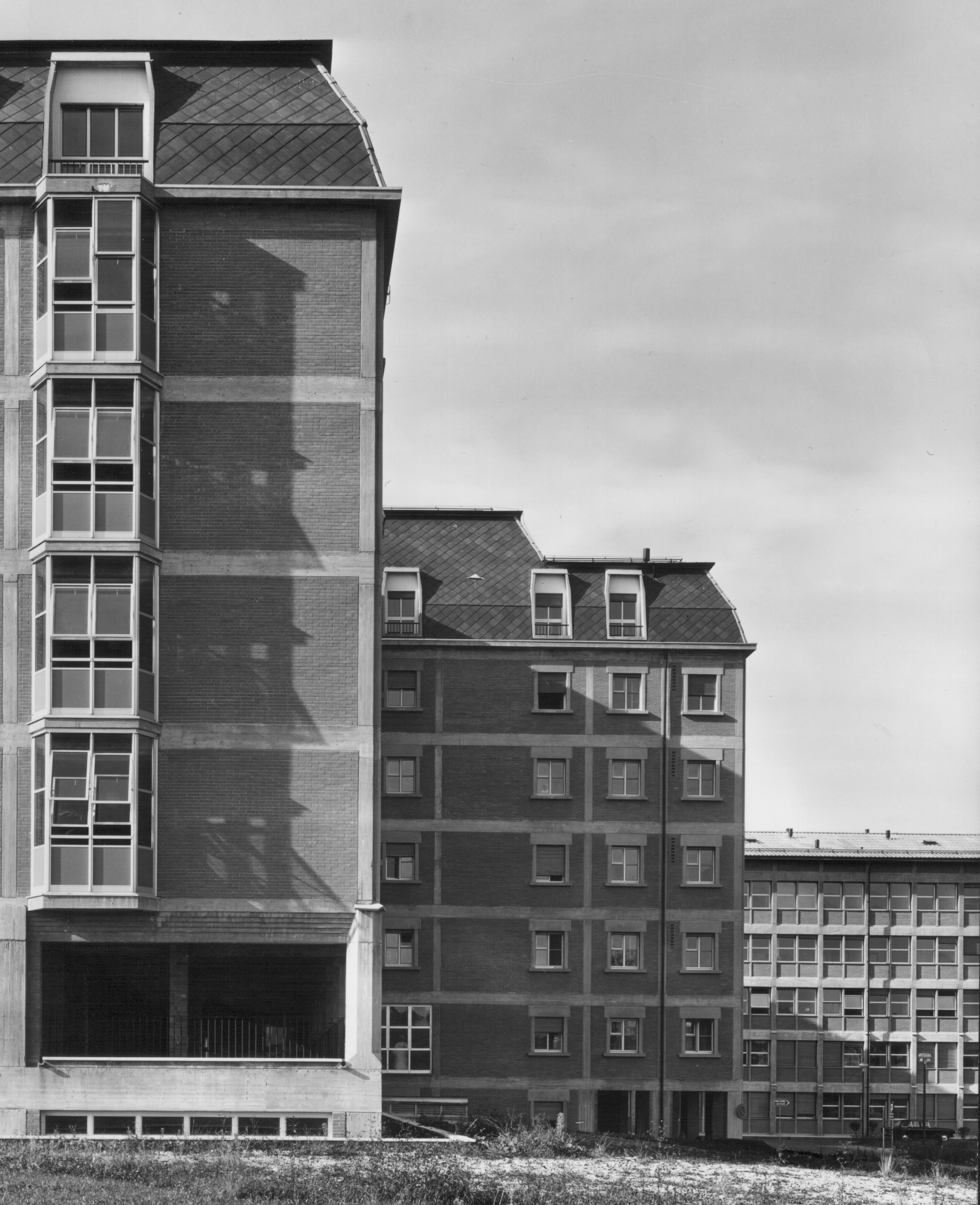 Quando Manfredini si accinge nel 1957 alla progettazione dell’ospedale i Belluno, lo fa arricchito di una esperienza figurativa eccezionale (…).